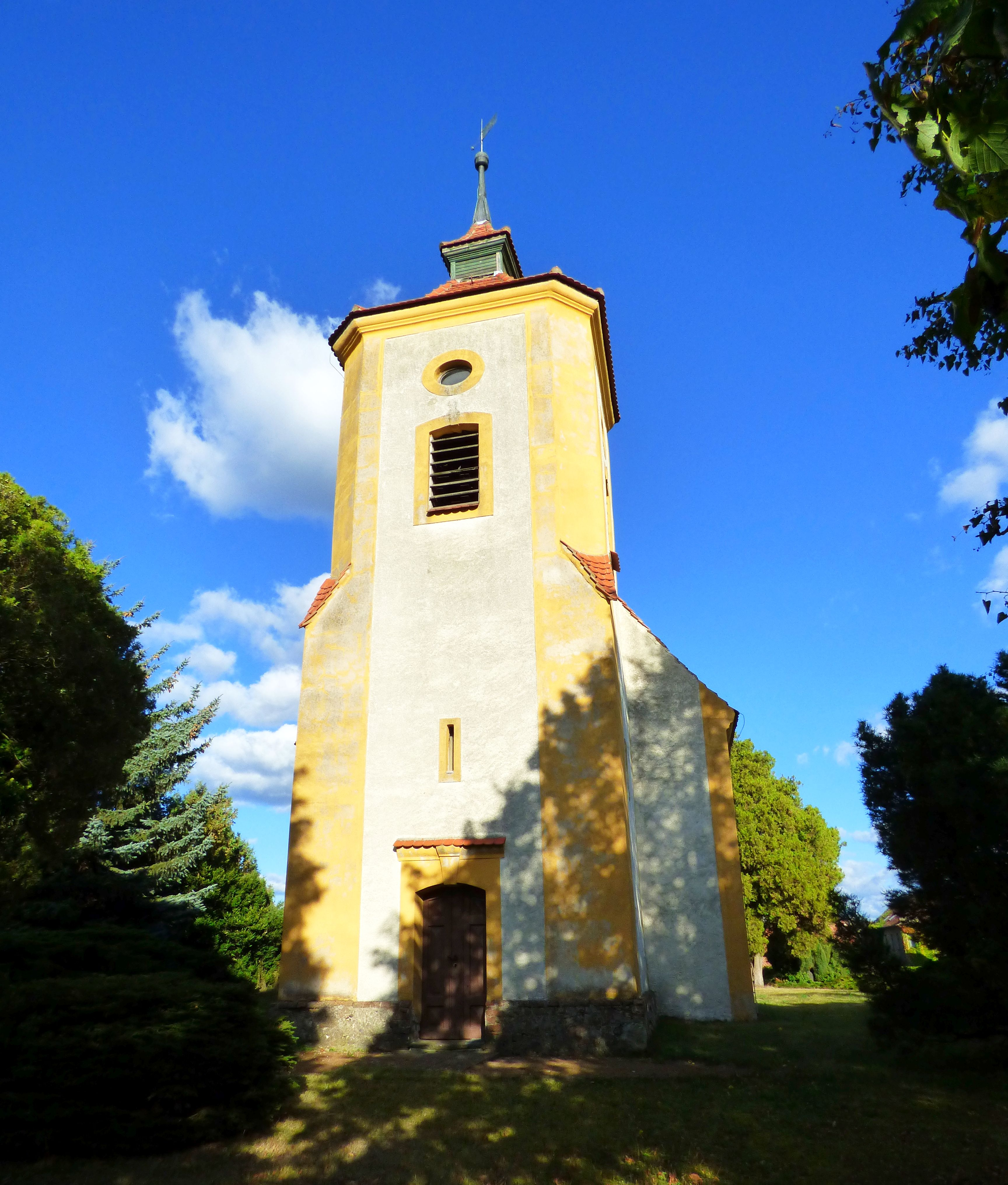 Dorfkirche Dreska